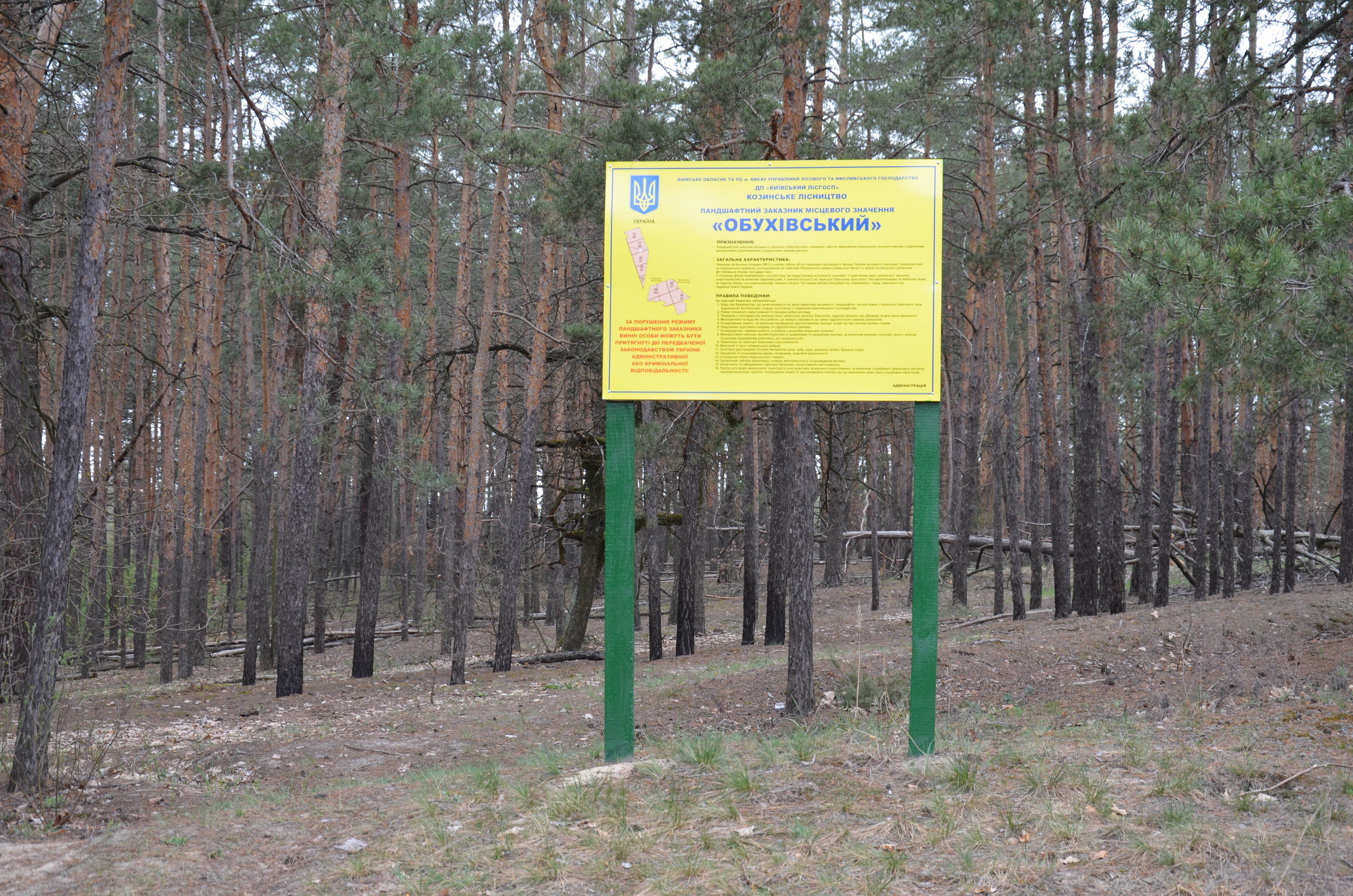 «Обухівський», Обухівський район, Обухівська та Українська міські ради, Козинська селищна рада